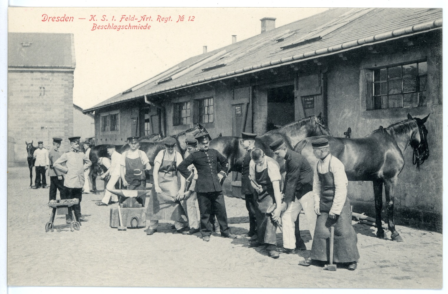 Dresden; 1. Königlich Sächsisches Feld-Artillerie-Regiment Nr. 12 - Beschlagschmiede This postcard is from publisher Brück & Sohn in Meißen ( This postcard has a unique number 15710 and is available in a higher resolution at the publisher. This images was uploaded in a cooperation project between Wikipedians and the publisher.